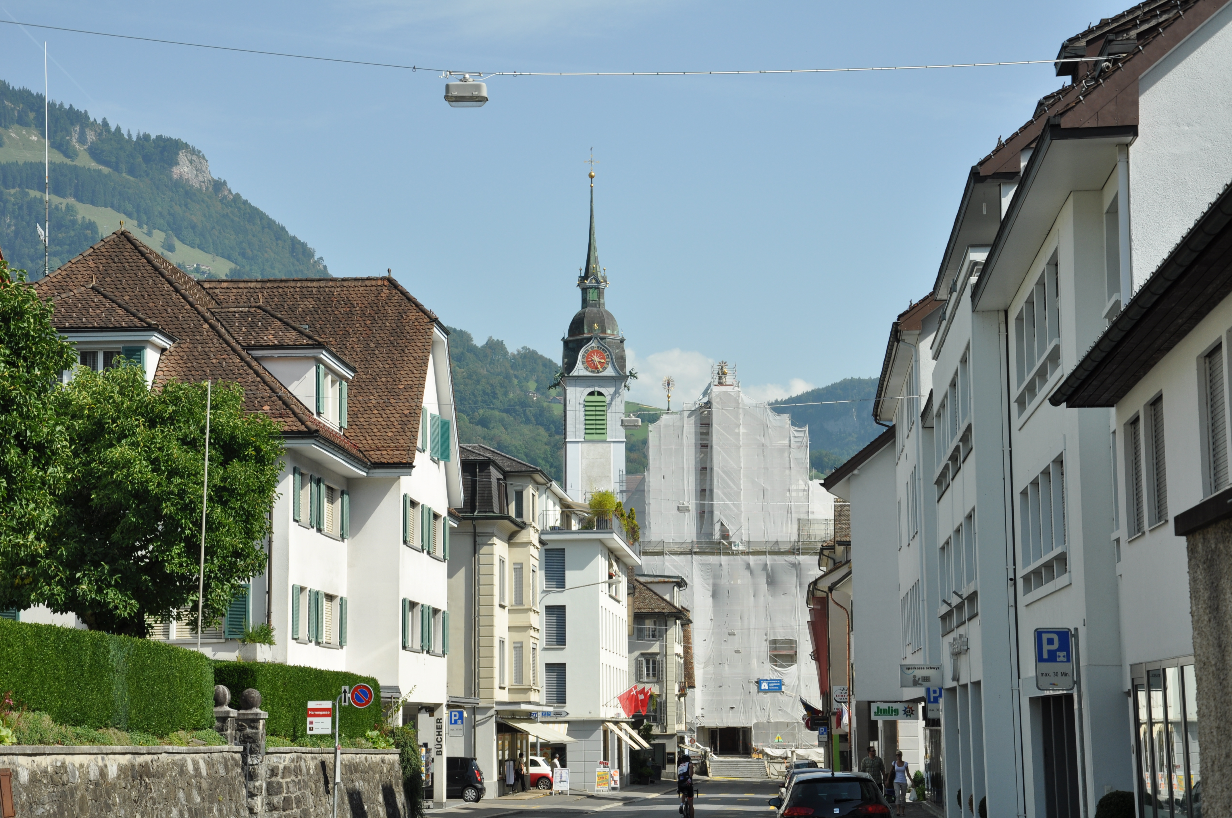 Schwyz: Pfarrkirche St. Martin